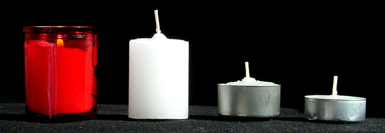 Verschiedene Varianten von Teelichten von klein (rechts, 4 Std. Brenndauer) bis groß (links, 24h Brenndauer)